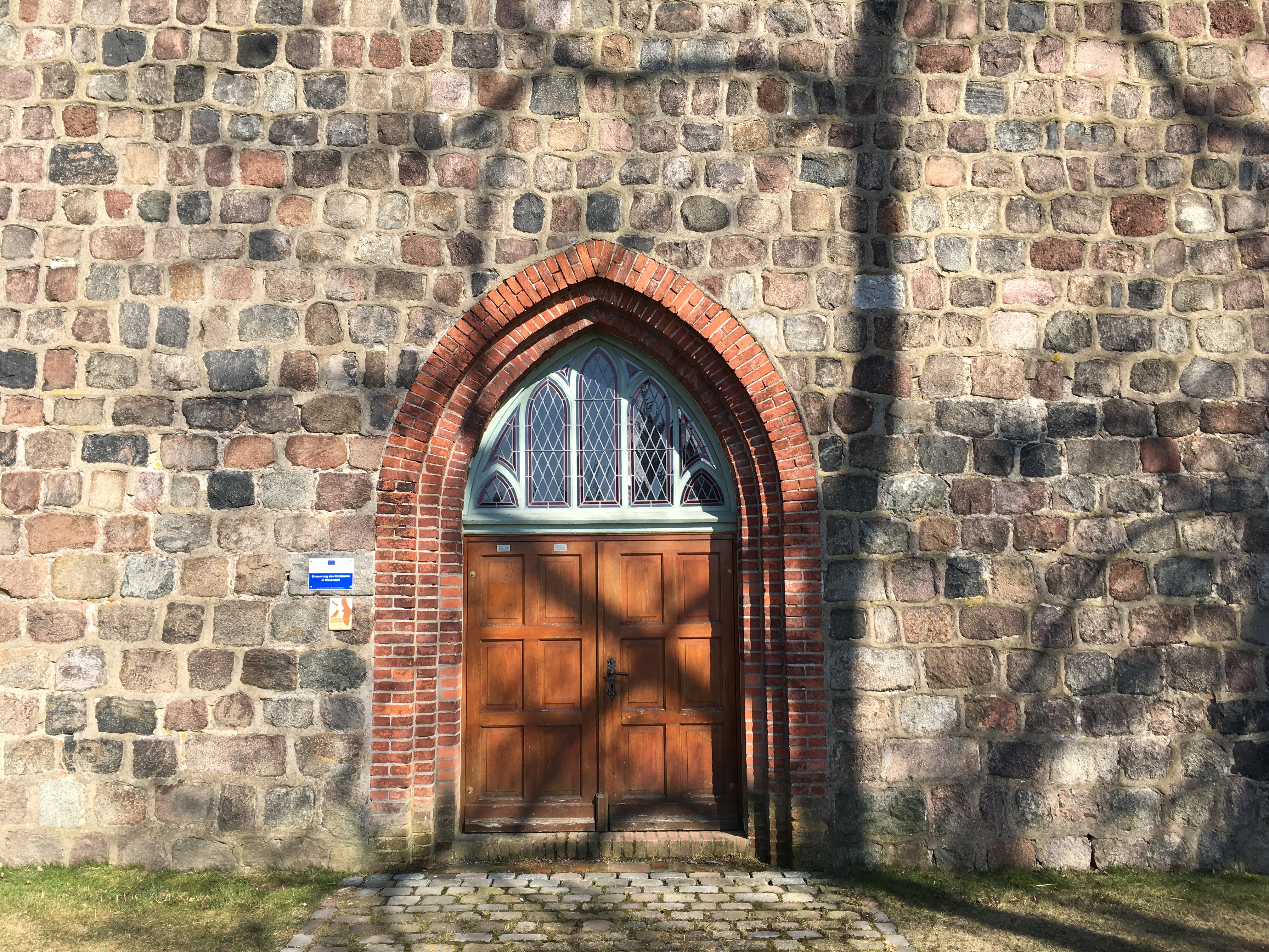 Die Dorfkirche Wesendahl ist eine spätromanische Feldsteinkirche in Altlandsberg im Landkreis Märkisch-Oderland.